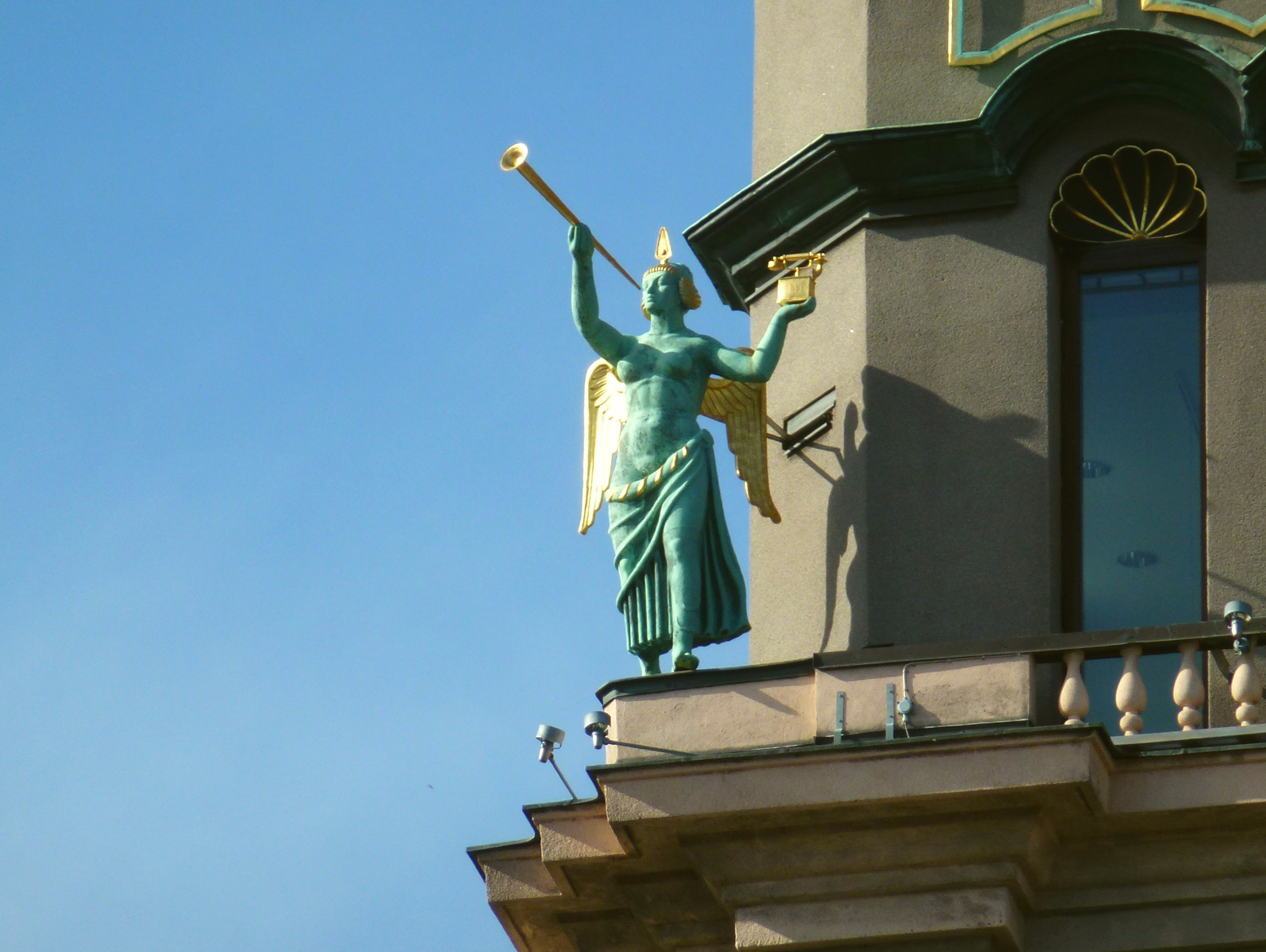 Södra Kungstorn takfigur med telefon LME